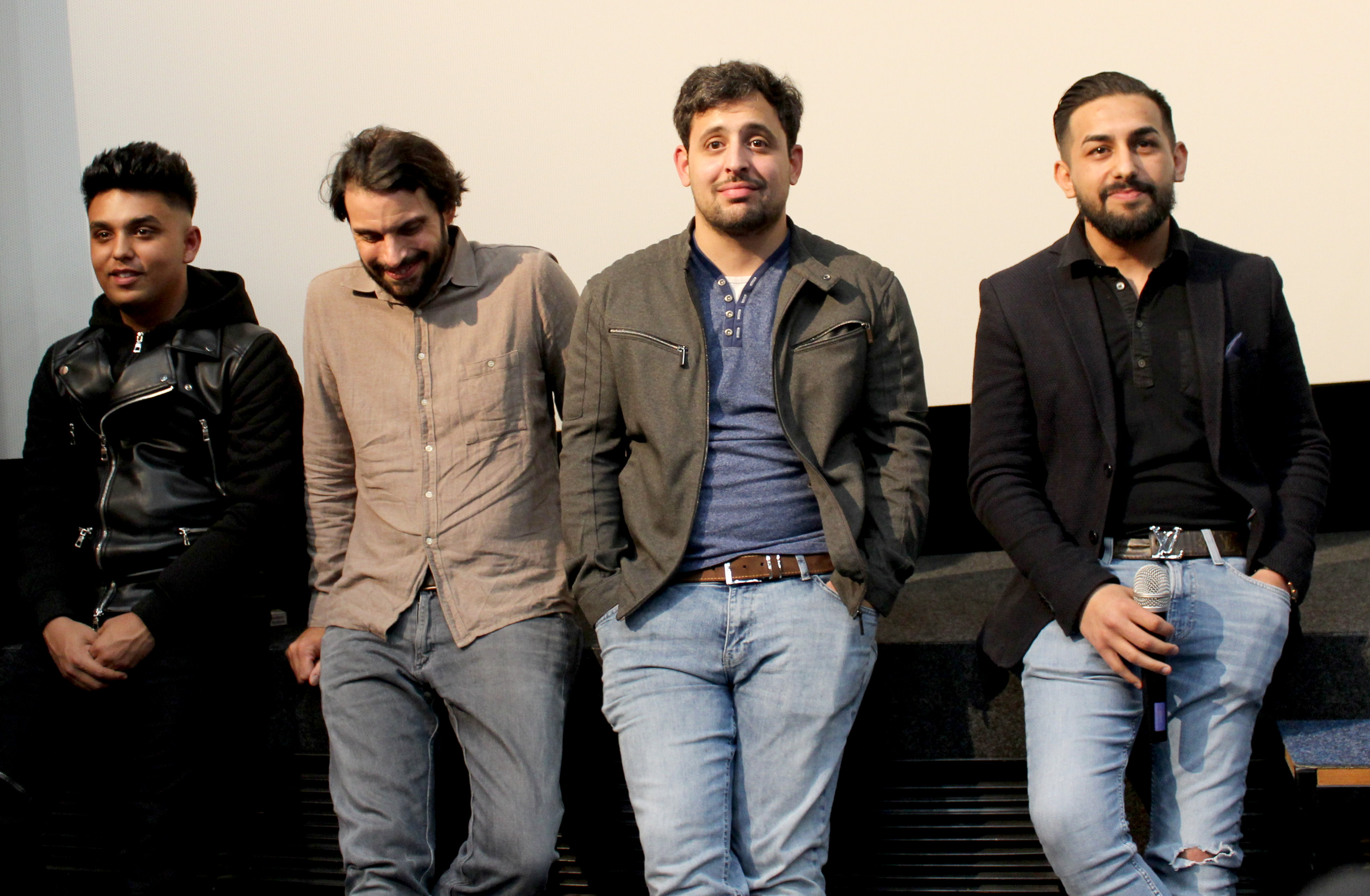 Oray ist ein deutscher Spielfilm von Mehmet Akif Büyükatalay. Er feierte seine Weltpremiere am 11. Februar 2019 auf der 69. Berlinale in der Sektion Perspektive Deutsches Kino und wurde dort mit dem Preis für den besten Erstlingsfilm prämiert. V.l.n.r.: Schauspieler Mikael Bajrami, Kameramann Christian Kochmann, Schauspieler Cem Göktas, Hauptdarsteller Zejhun Dimirov. Aufnahme aus dem Metropol-Filmkunstkino Düsseldorf 2019.